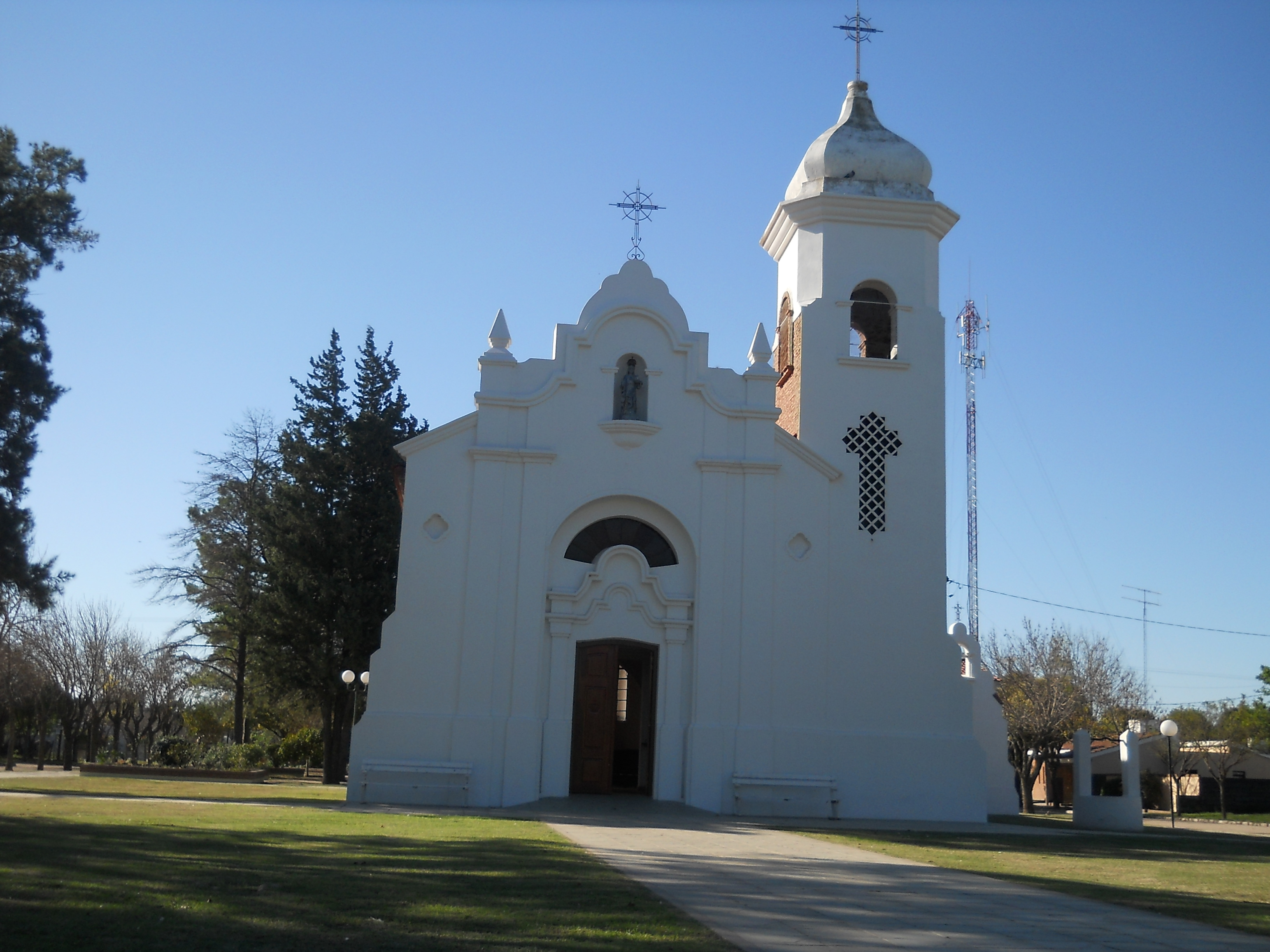 Interior capilla